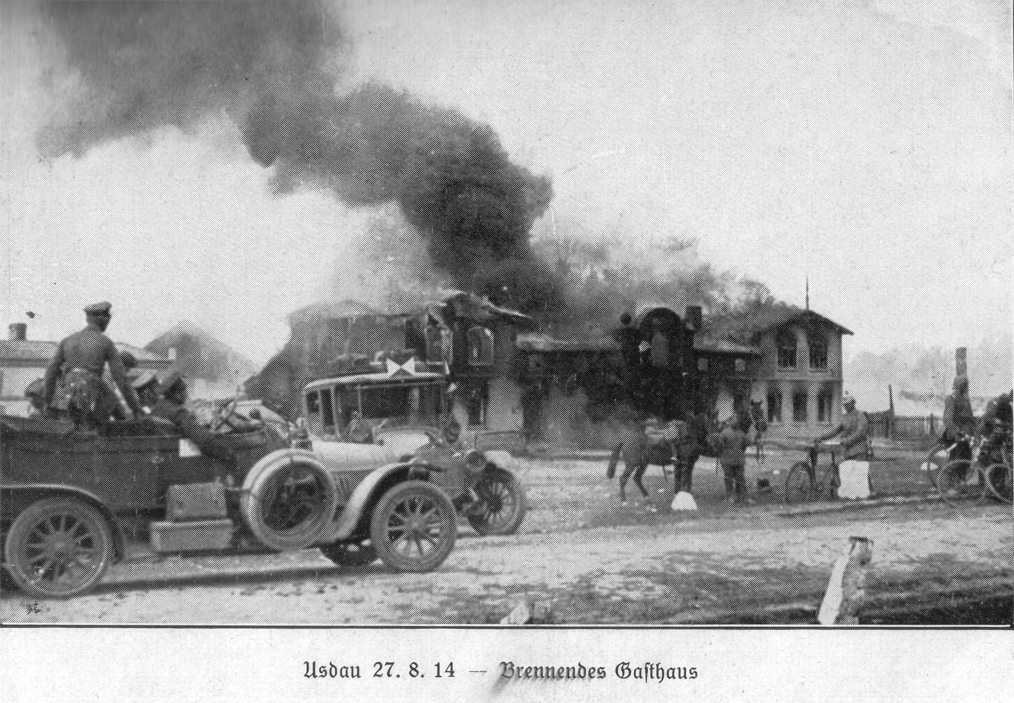 Gefecht bei Usdau